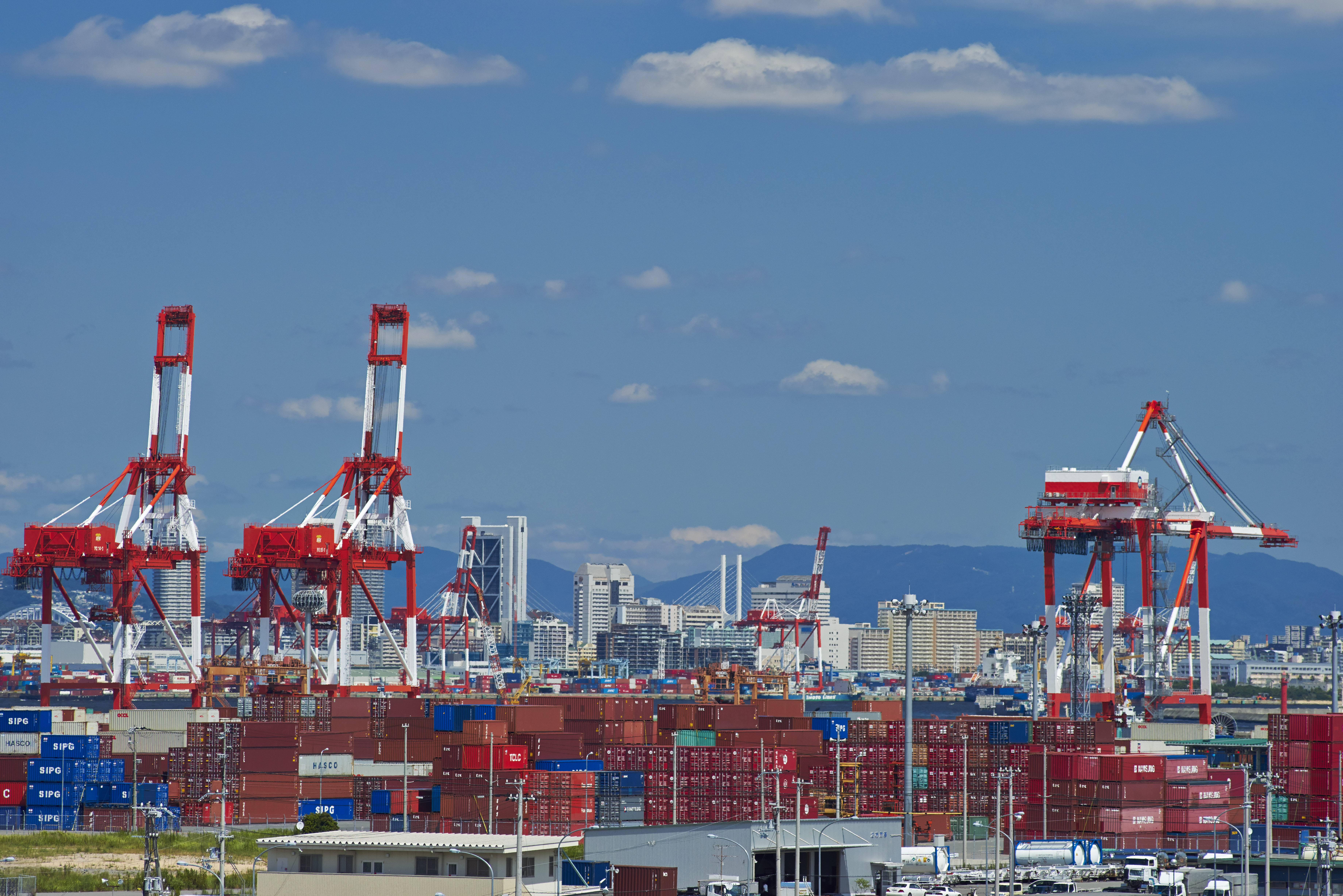 神戸スカイブリッジよりポートアイランド南側コンテナバース